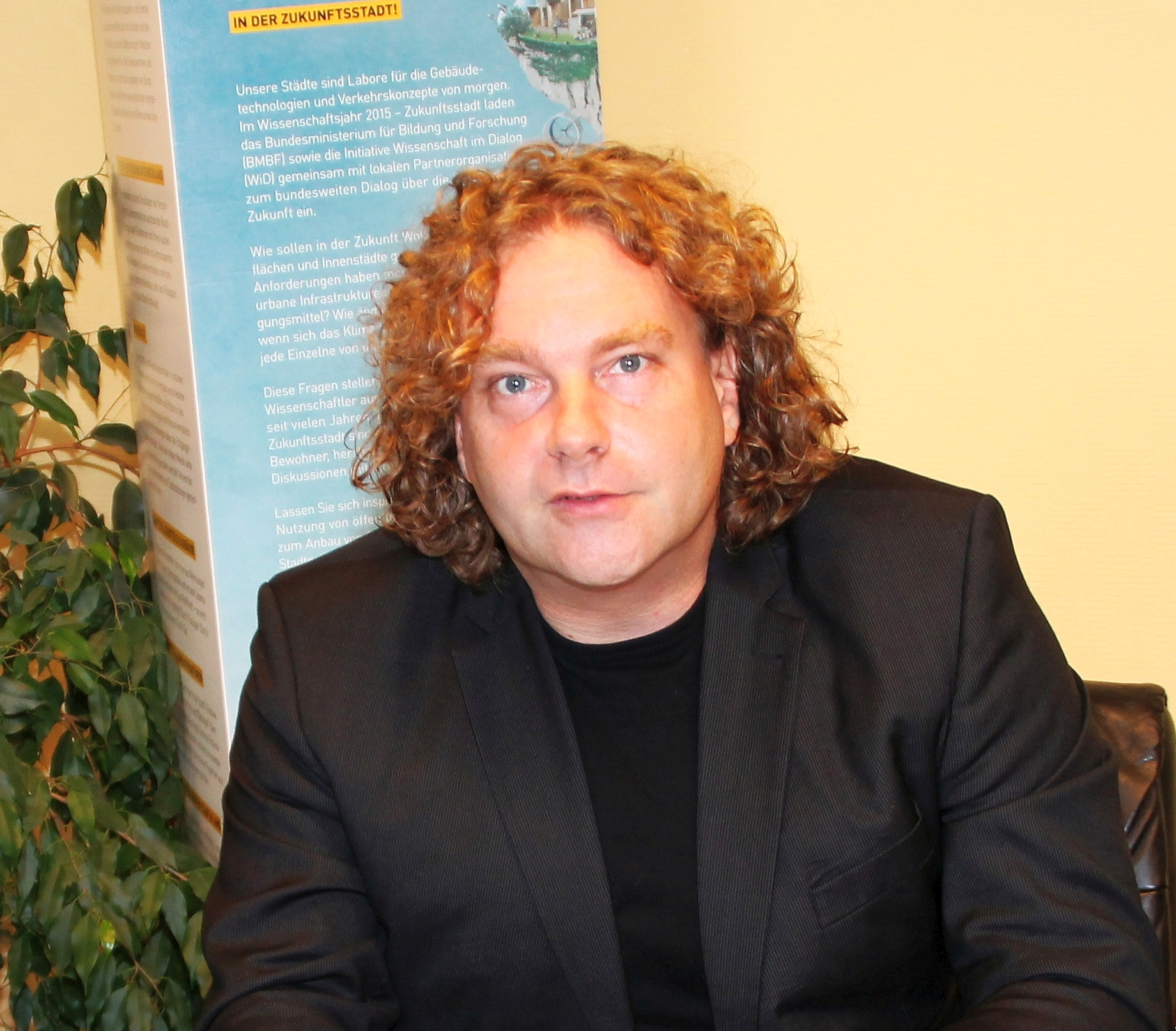 Portraitfoto am Schreibtisch